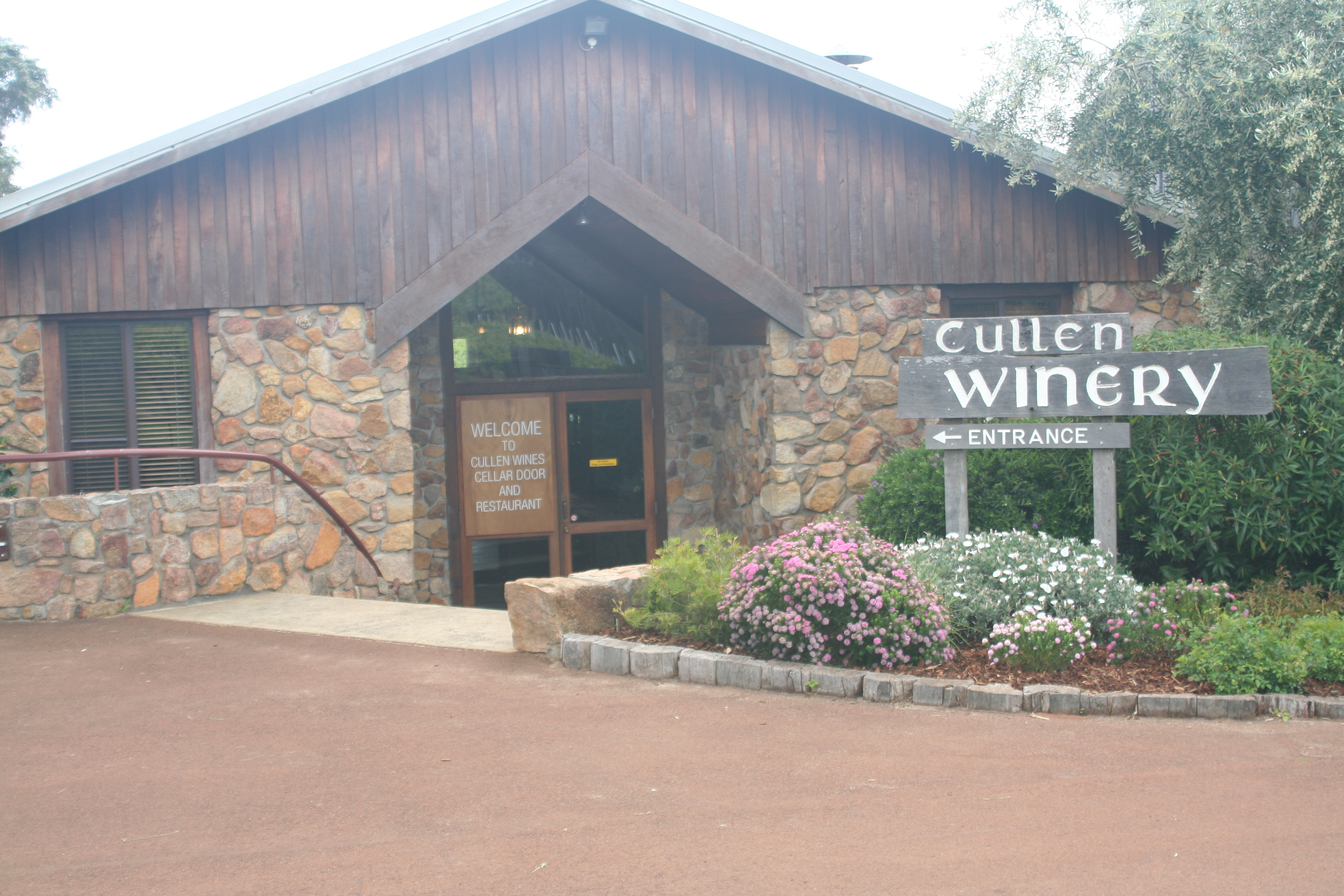 Cullen Winery